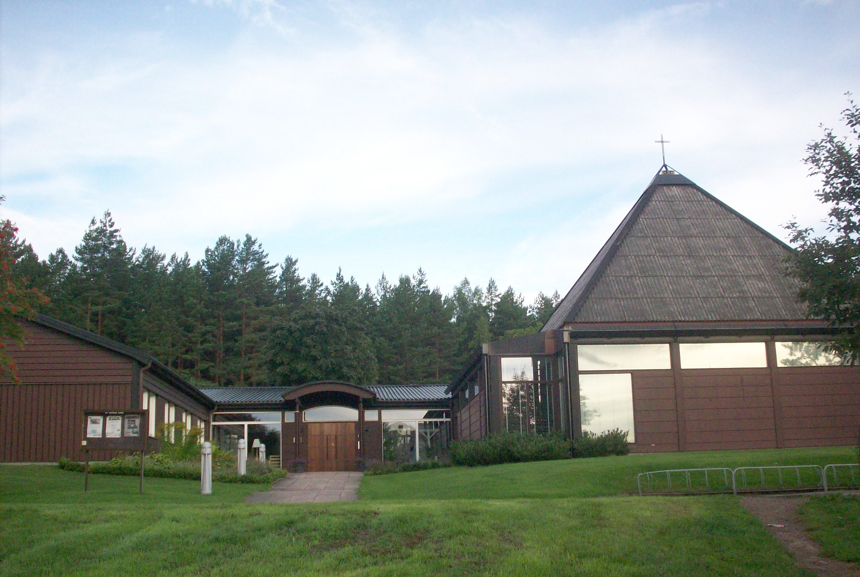 St Matteus kyrka i Skövde. Uppförd 1965. Arkitekt: Rolf Bergh.